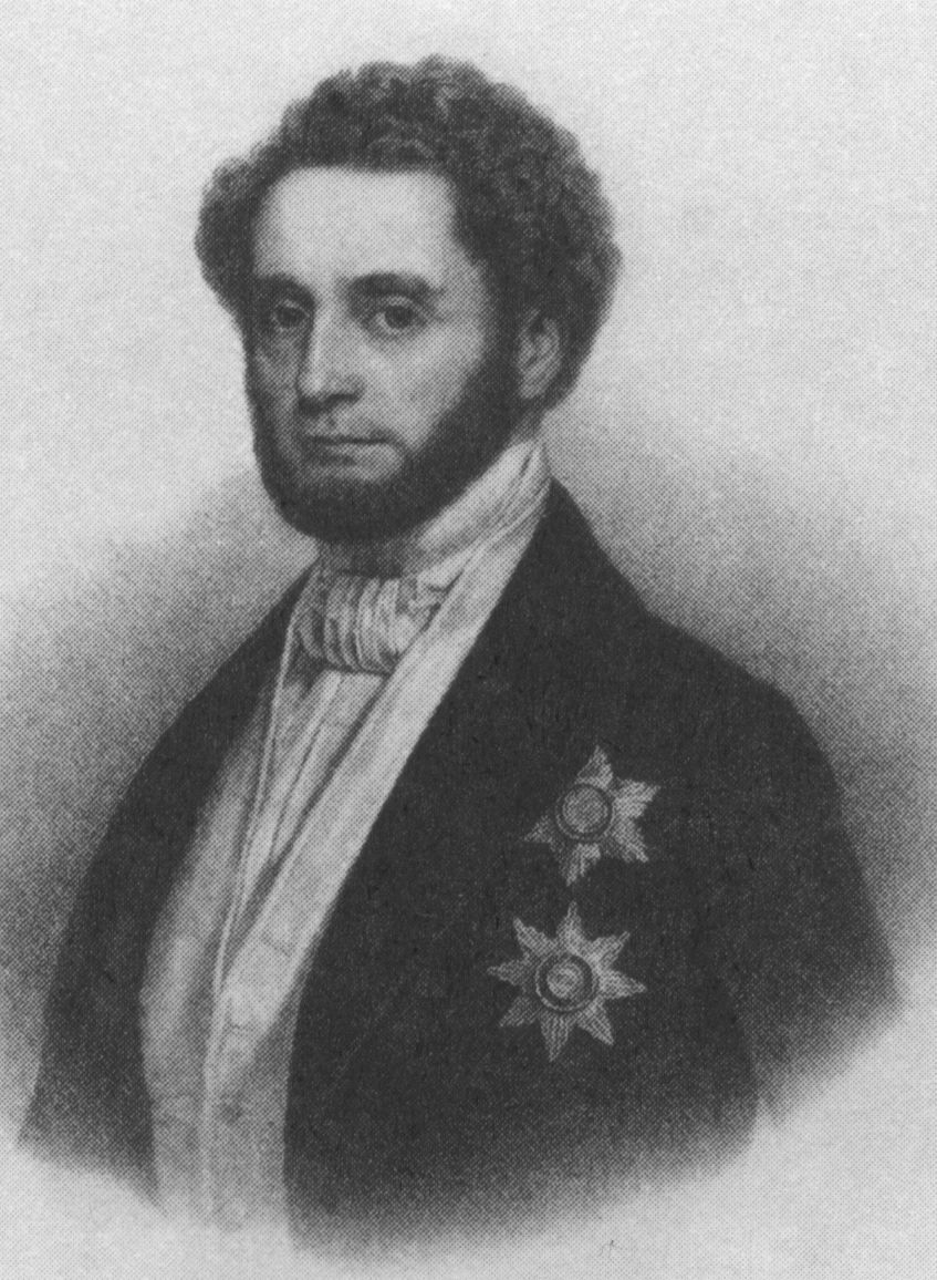 Ferdinand von Zschinsky (1797–1858), deutscher Politiker, sächsischer Landesminister